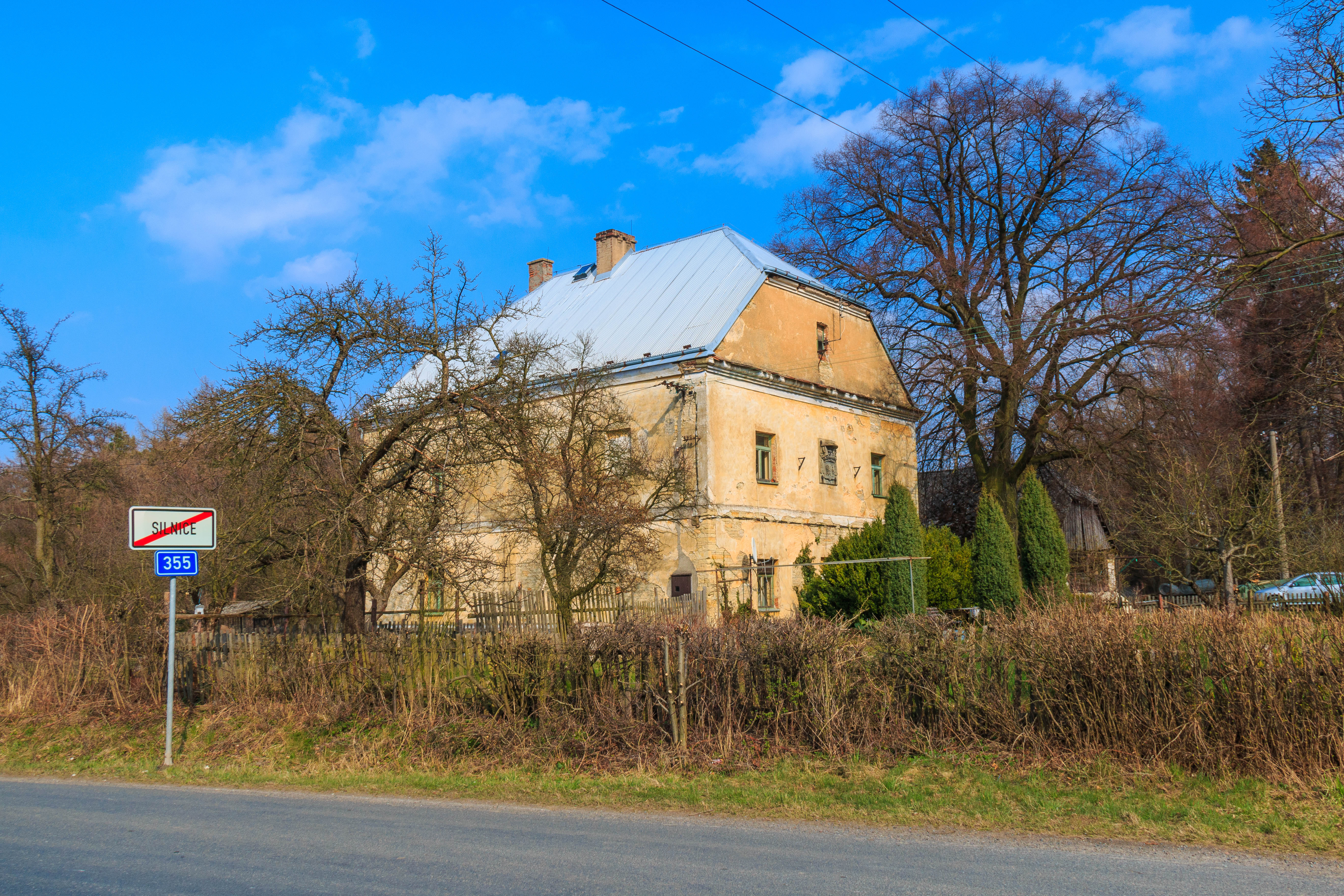 Silnice č. 1